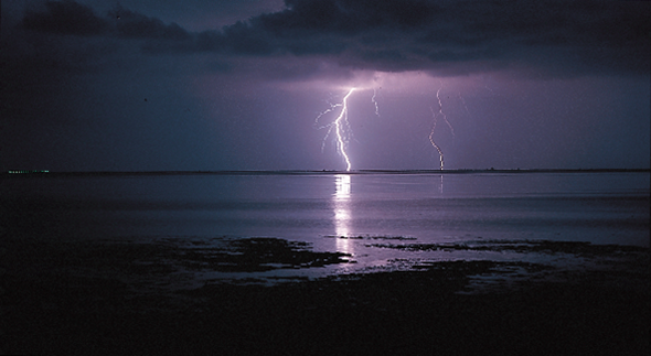 Eclair sur le lac Ghar El Melh.